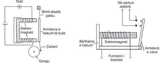 Elektromagnetizmi